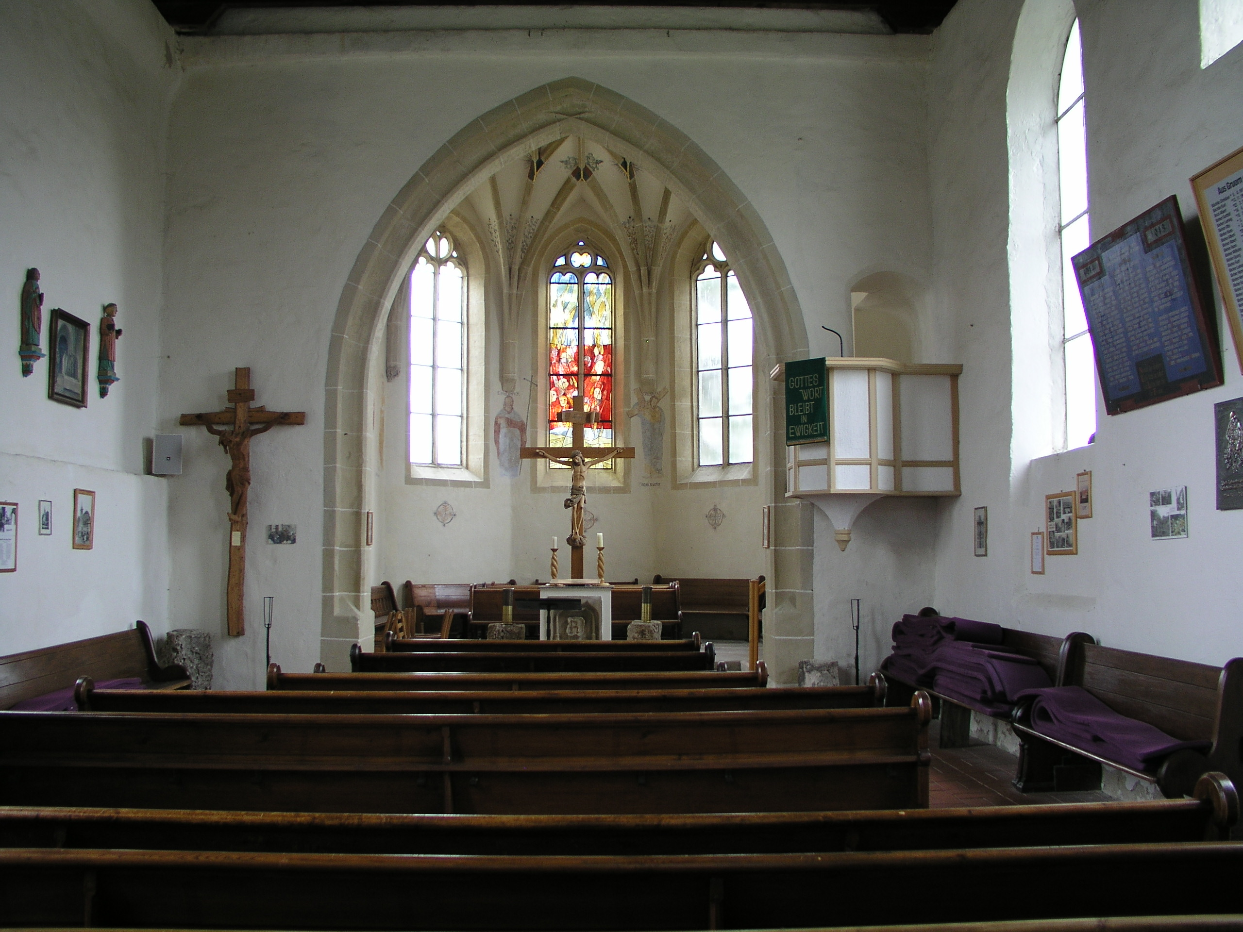 Die Kirche von Gruorn. Innenansicht. Fotografiert von Otto Buchegger am 16.4.2005. Lizenz GNU-FDL.